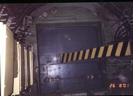 Гермозатвор в служебном тоннеле метро под тоннелем ССВ между Сокольнической линией и Д6 в Москве. Вид со стороны линии Д6